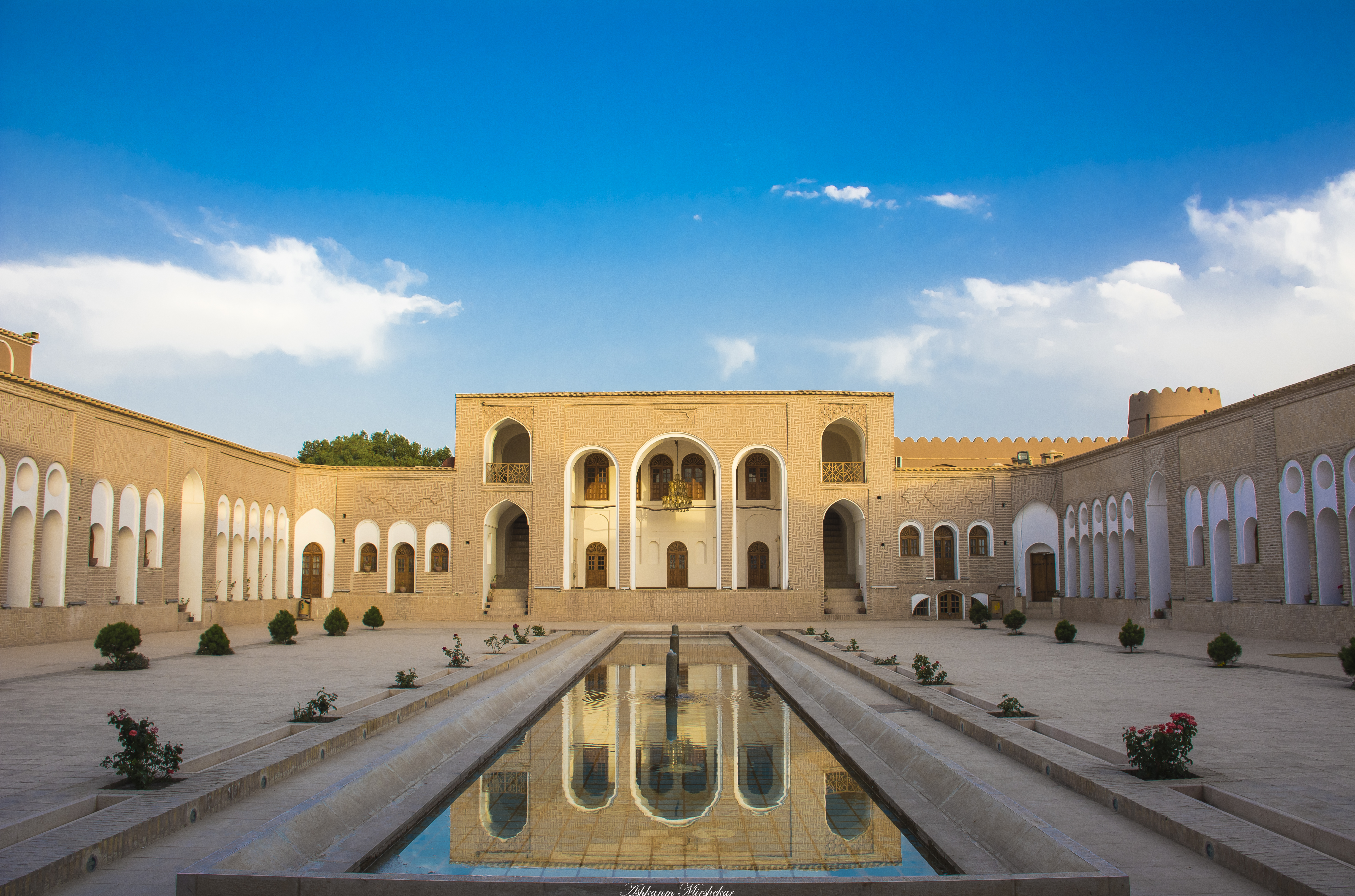 مجموعه حاج آقا علی - بزرگترین بنای خشت و گلی در جهان